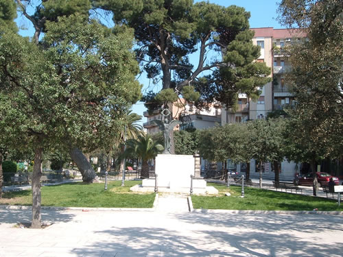 Ara commemorativa dei Caduti in guerra